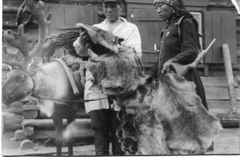 Нохчийн: Эвенкаш